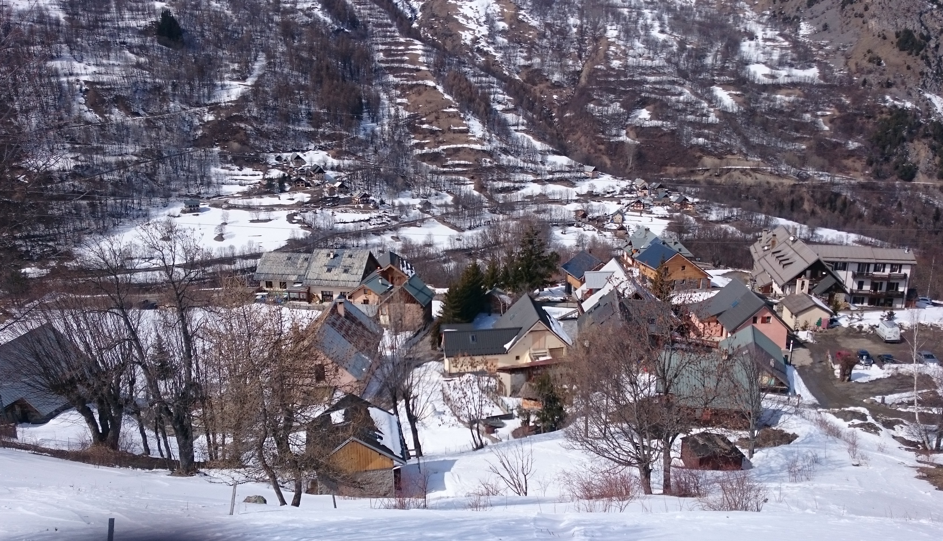 Le hameau des Granges vu de haut, à proximité de la ferme de l'Adroit